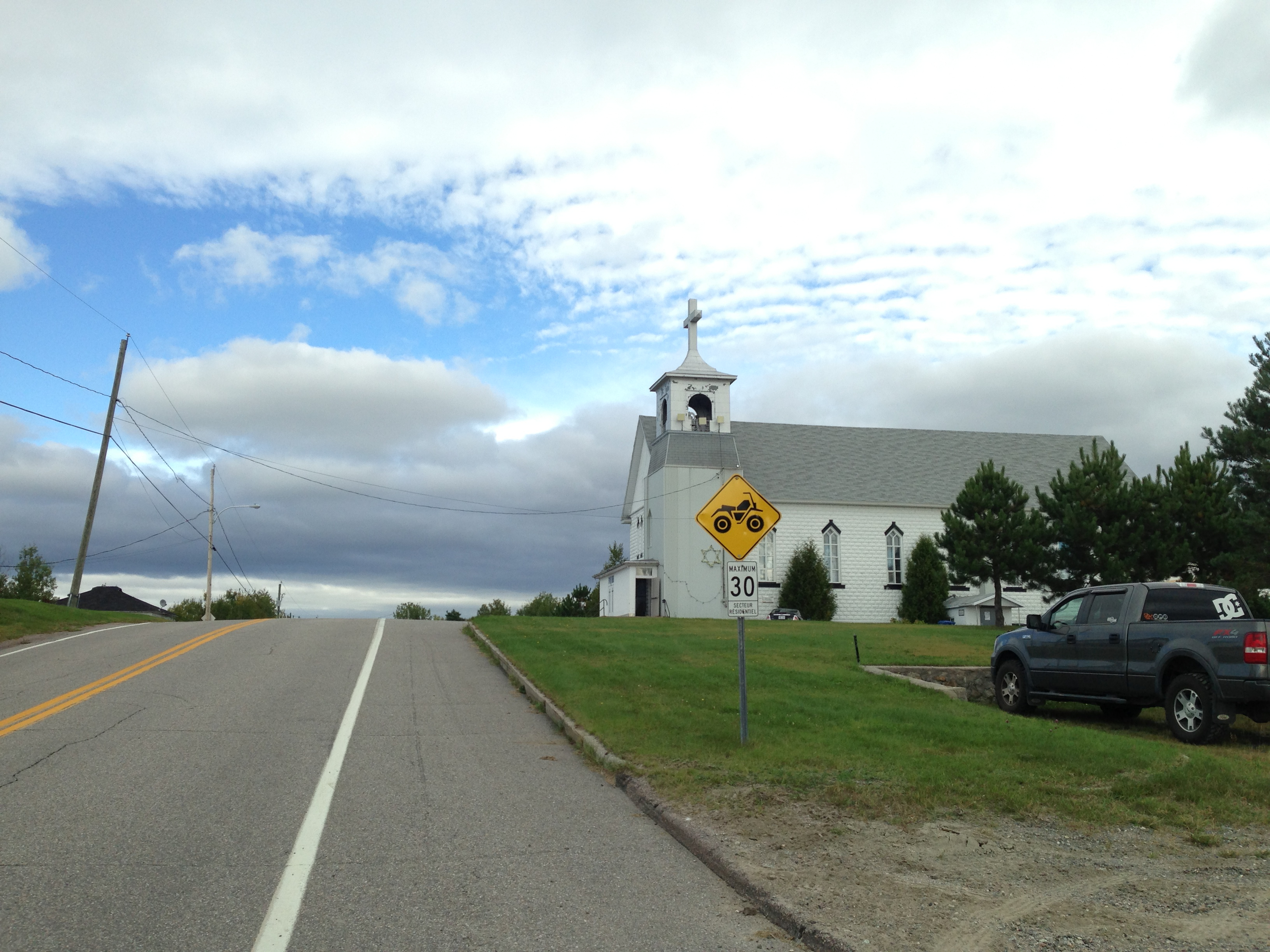 Saint-Élisabeth-de-Proulx (TNO des Passes-Dangereuses), Québec